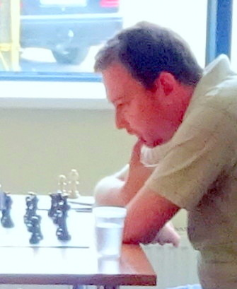 Sigitas Kalvaitis Klaipėdos šachmatų festivalyje "Jūros šventė 2016"